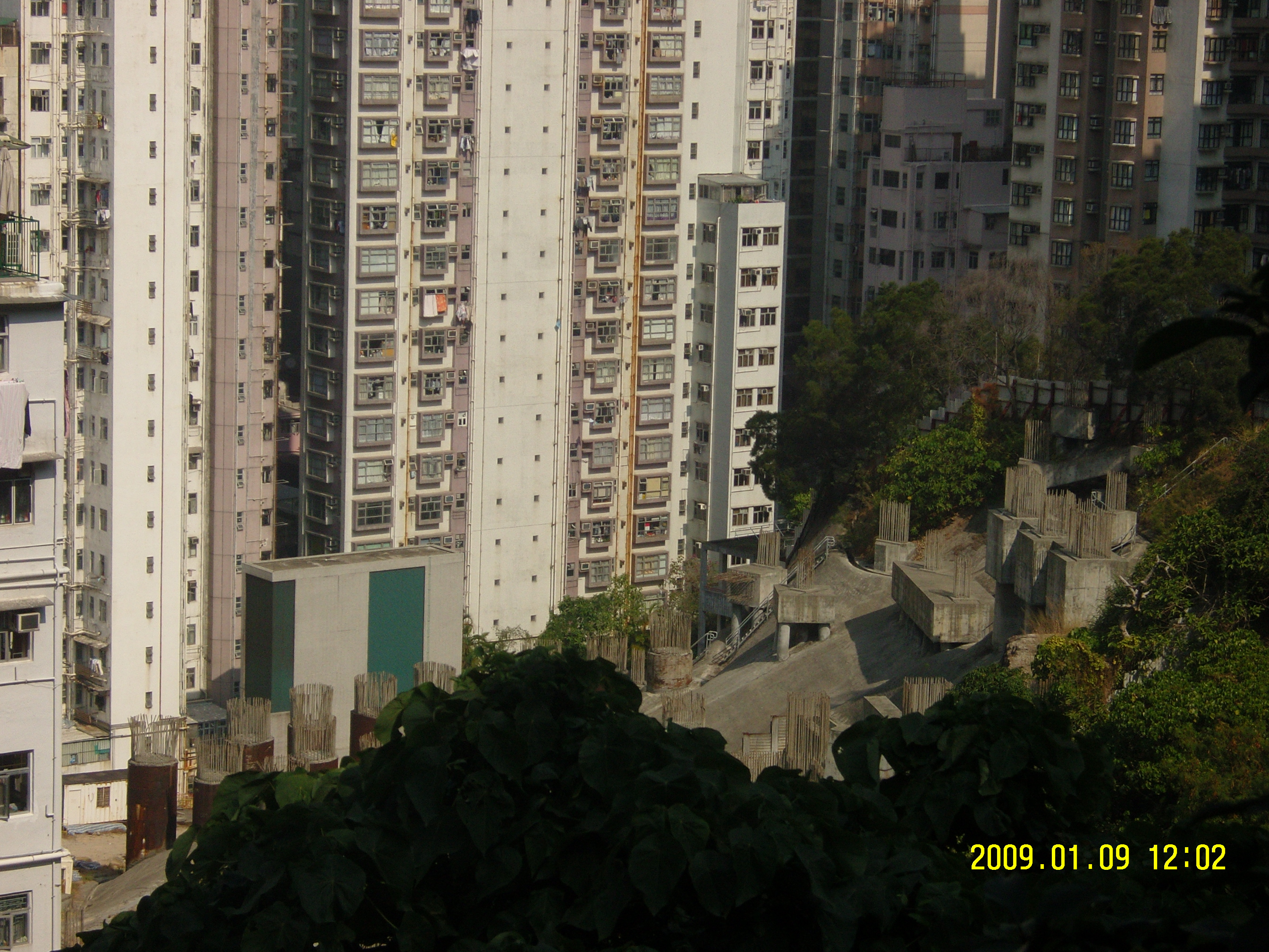 遠眺前丹拿山邨空地